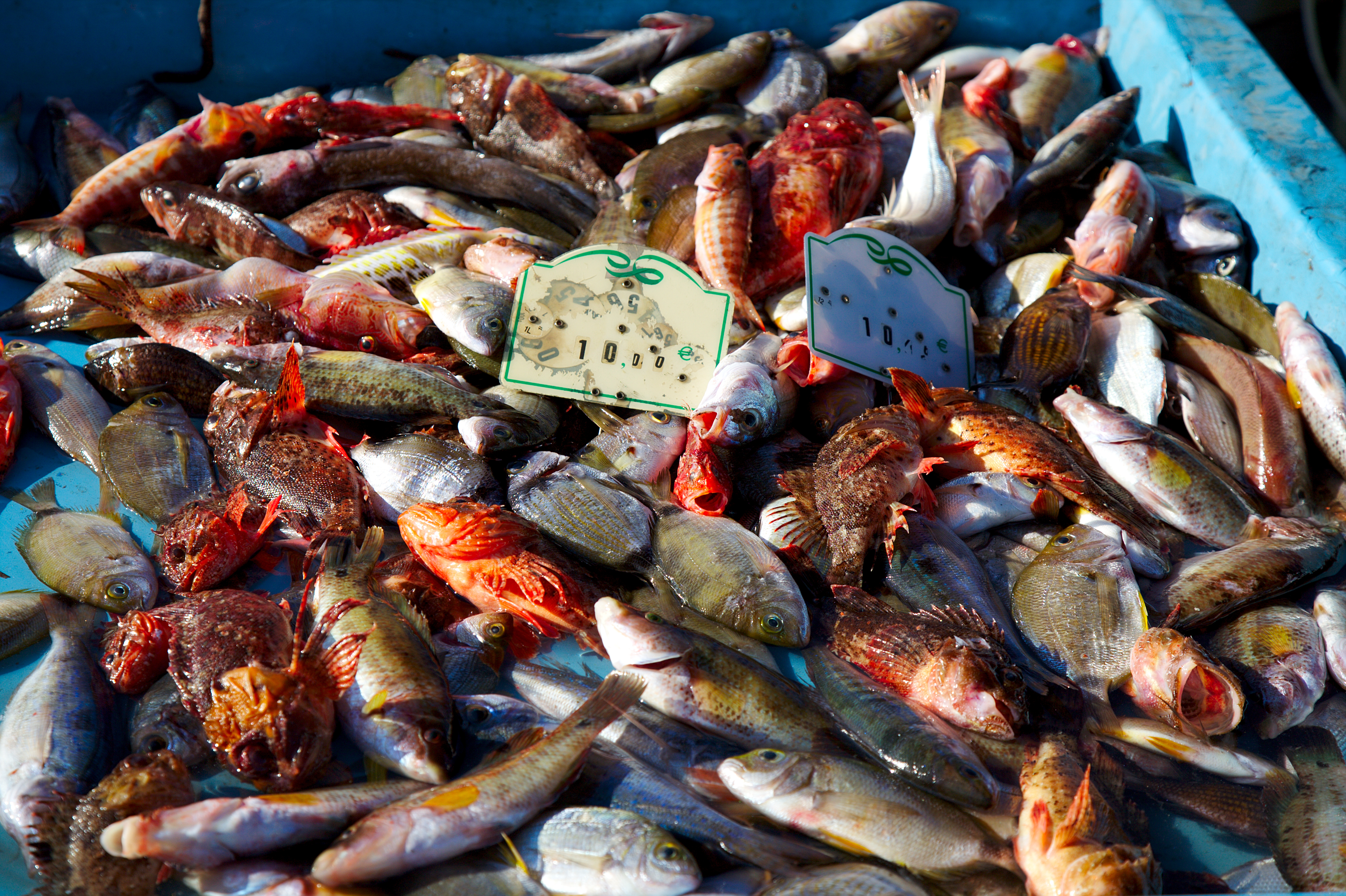 Poissons pour la bouillabaisse sur le Vieux-Port de Marseille